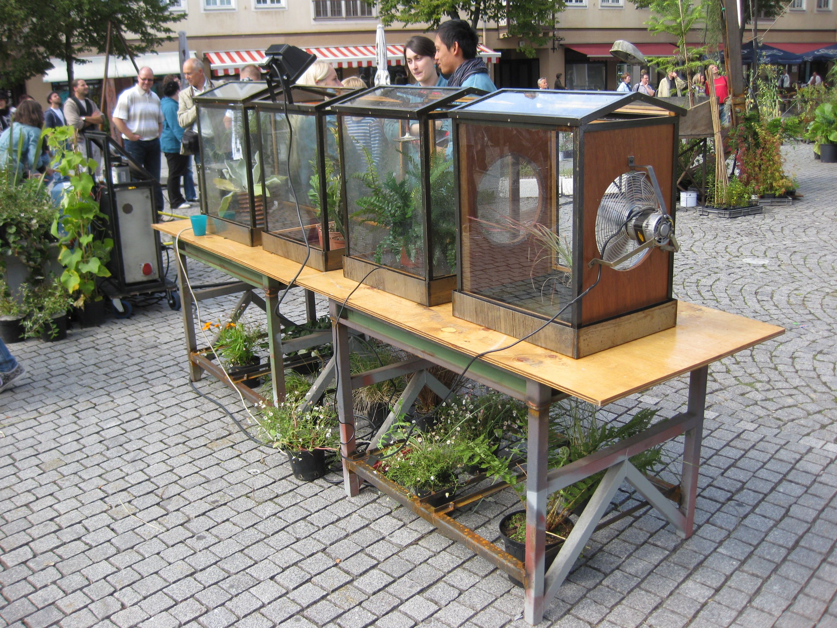 Strassentheater Éxpédition végétale Rathausplatz Dessau